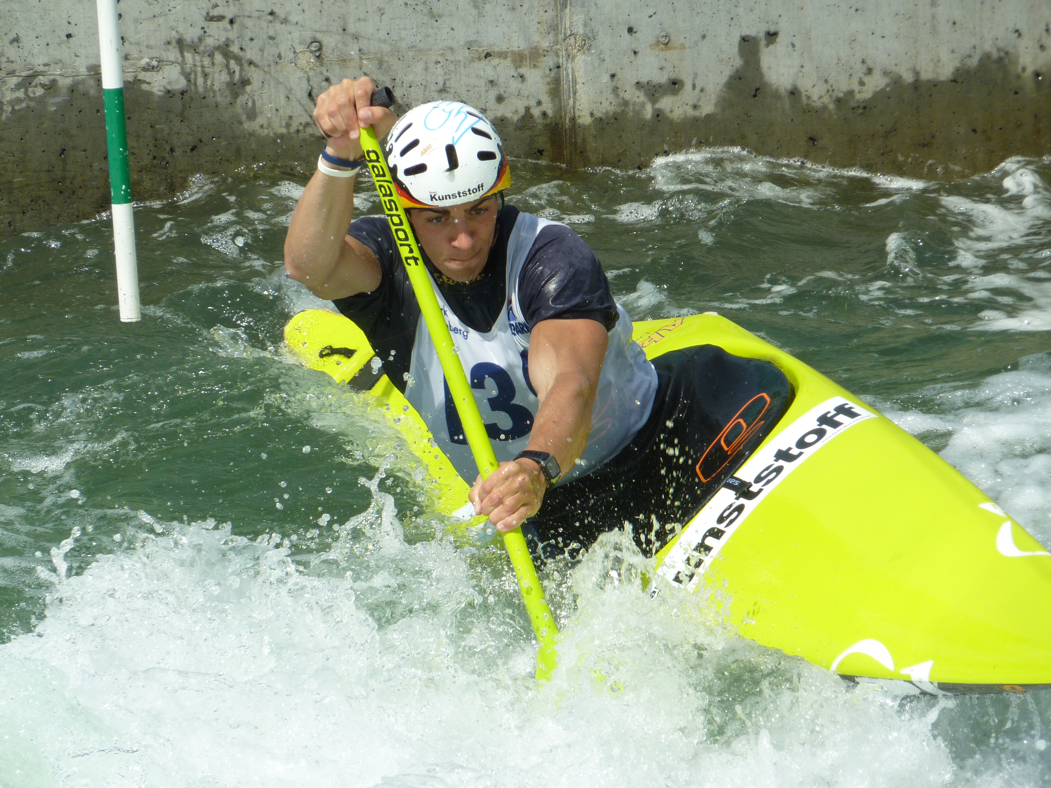 Deutscher Kanute (Kanu-Slalom)